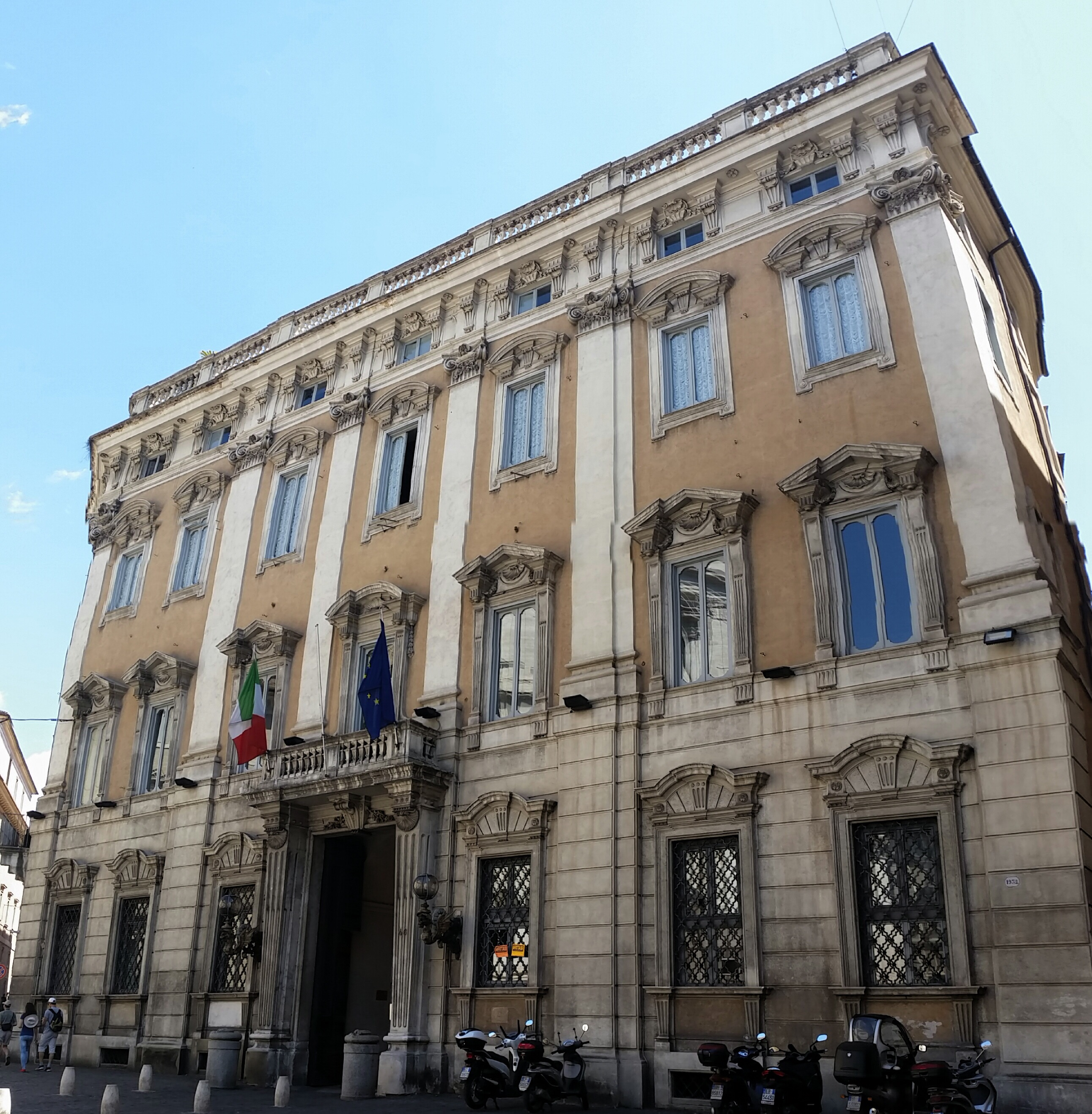 Ex sede DC. Sede Commissione di Garanzia sugli scioperi nei servizi pubblici essenziali.